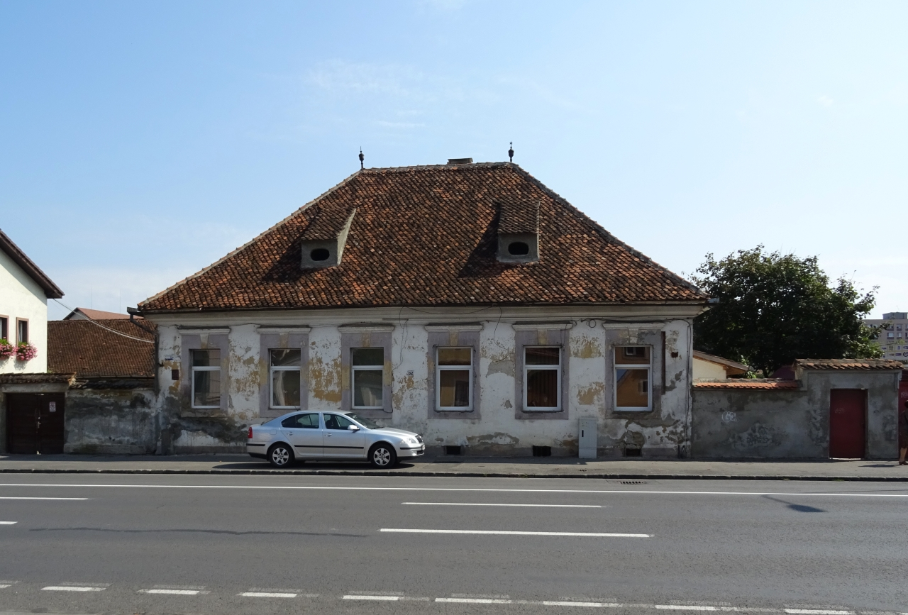 Casă veche